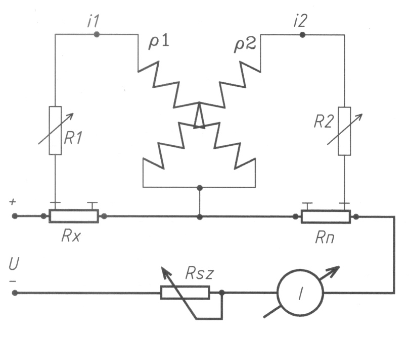 Két kis ellenállás összemérése kereszttekercses hányadosmérővel